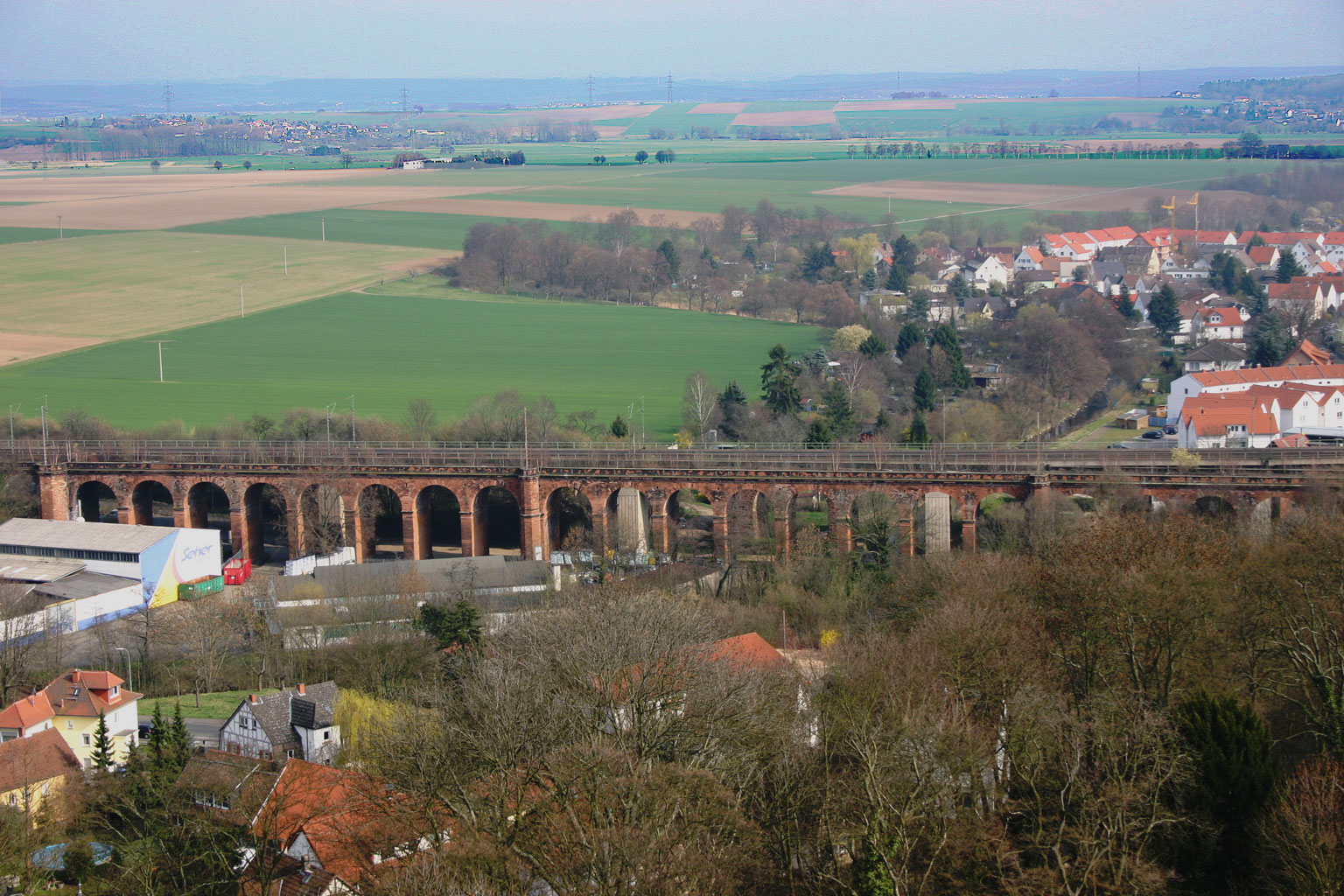 "Rosentalviadukt" in Friedberg, Deutschland.